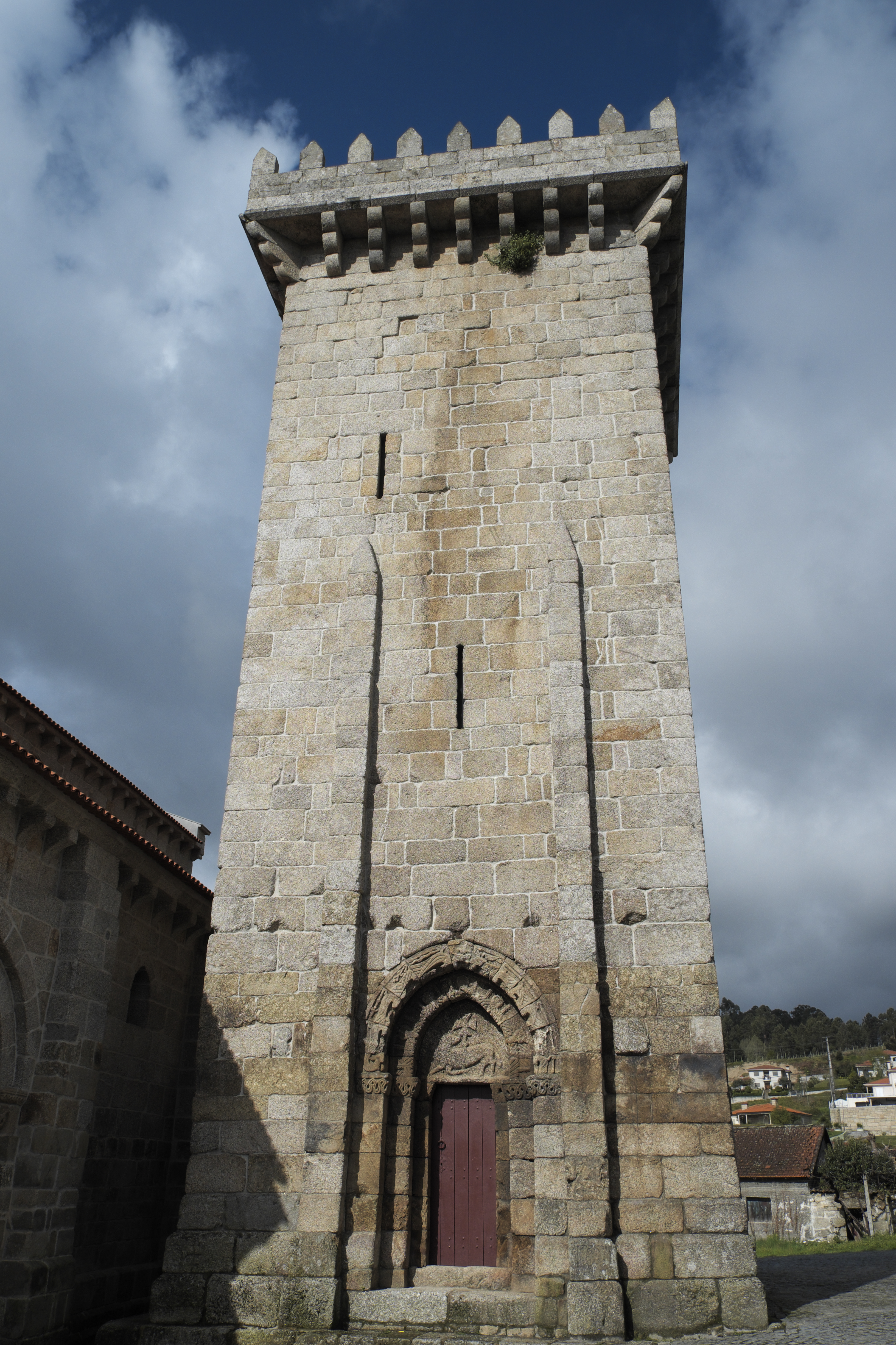 Ehemaliges Benediktinerkloster São Salvador in Travanca (Amarante) im Distrikt Porto in Nordportugal, Glockenturm